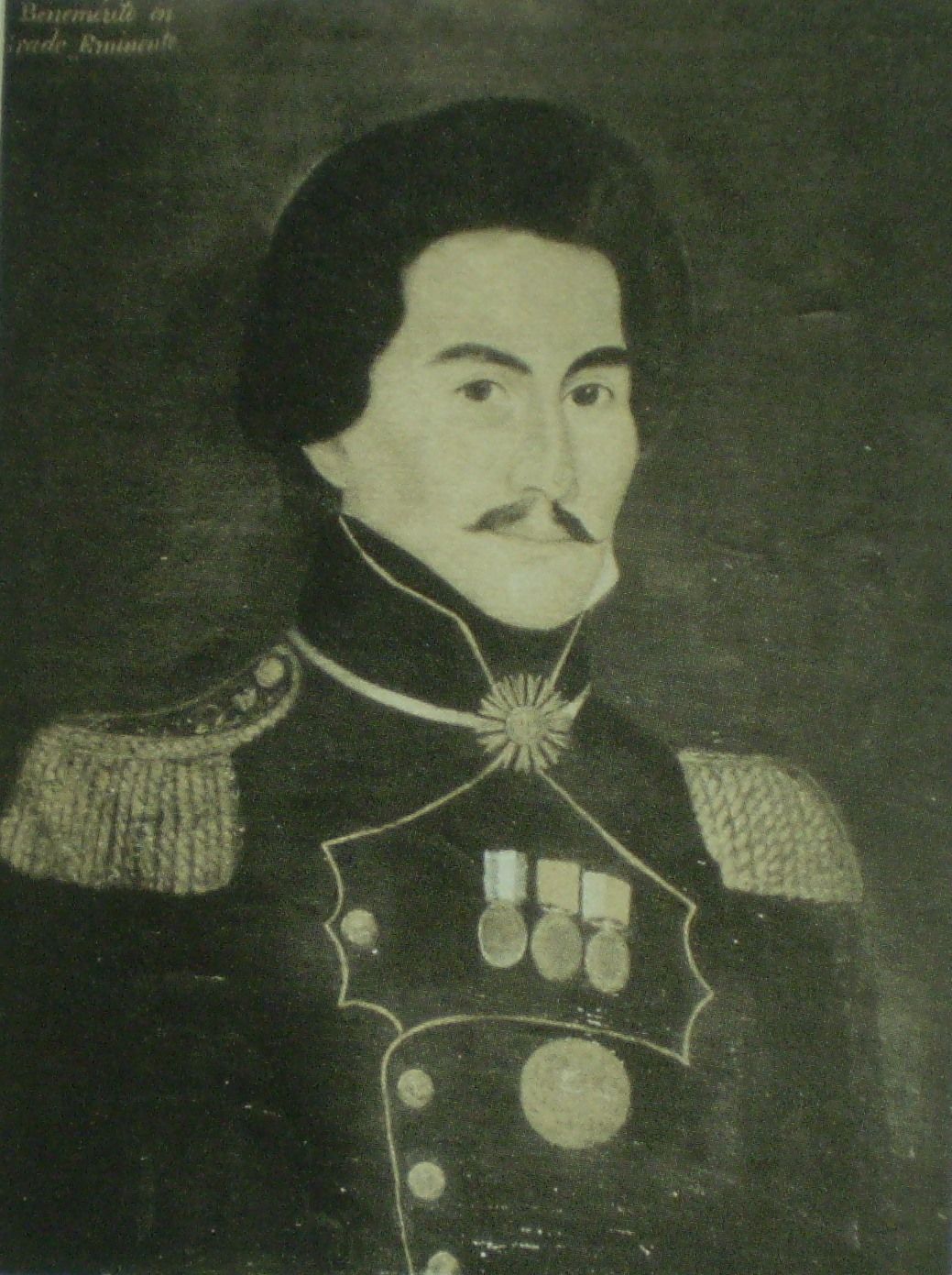 Pascual Pringles